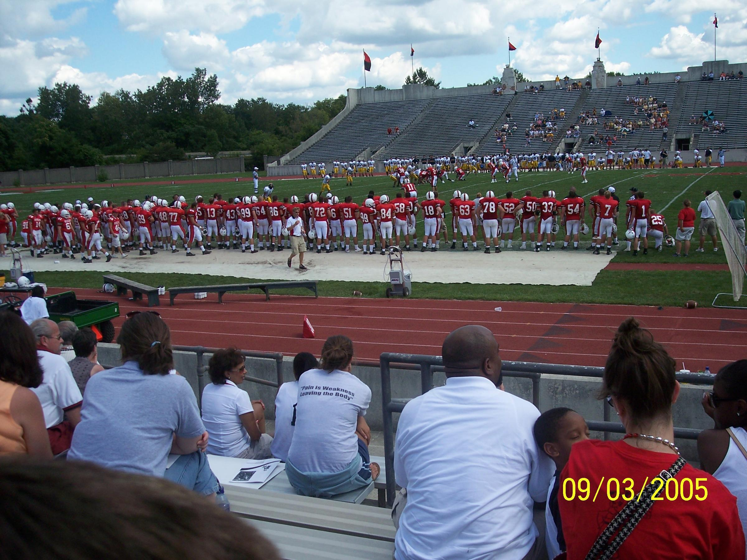 Selby Stadium